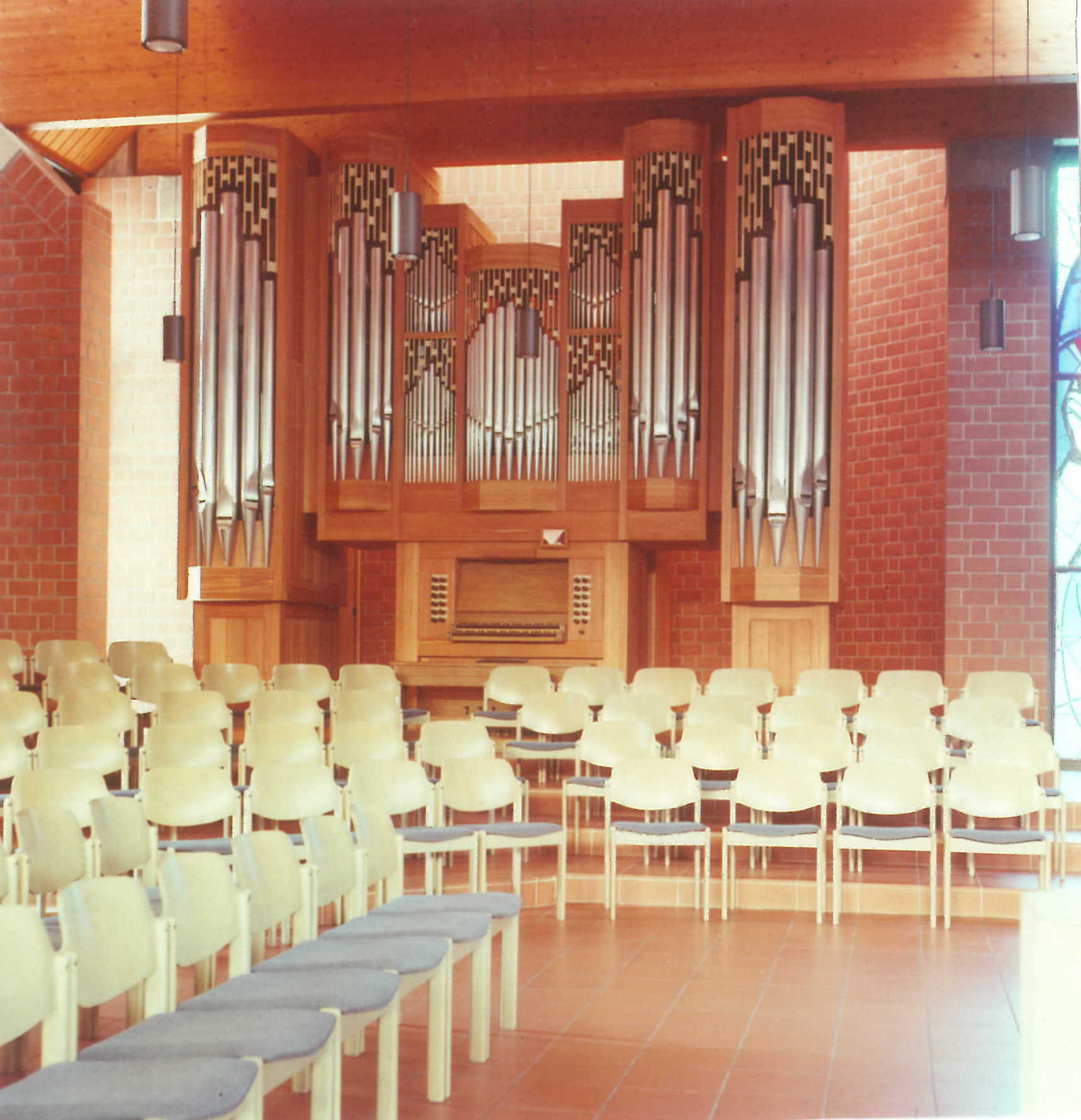 Orgel Braunschweig, Emmauskirche